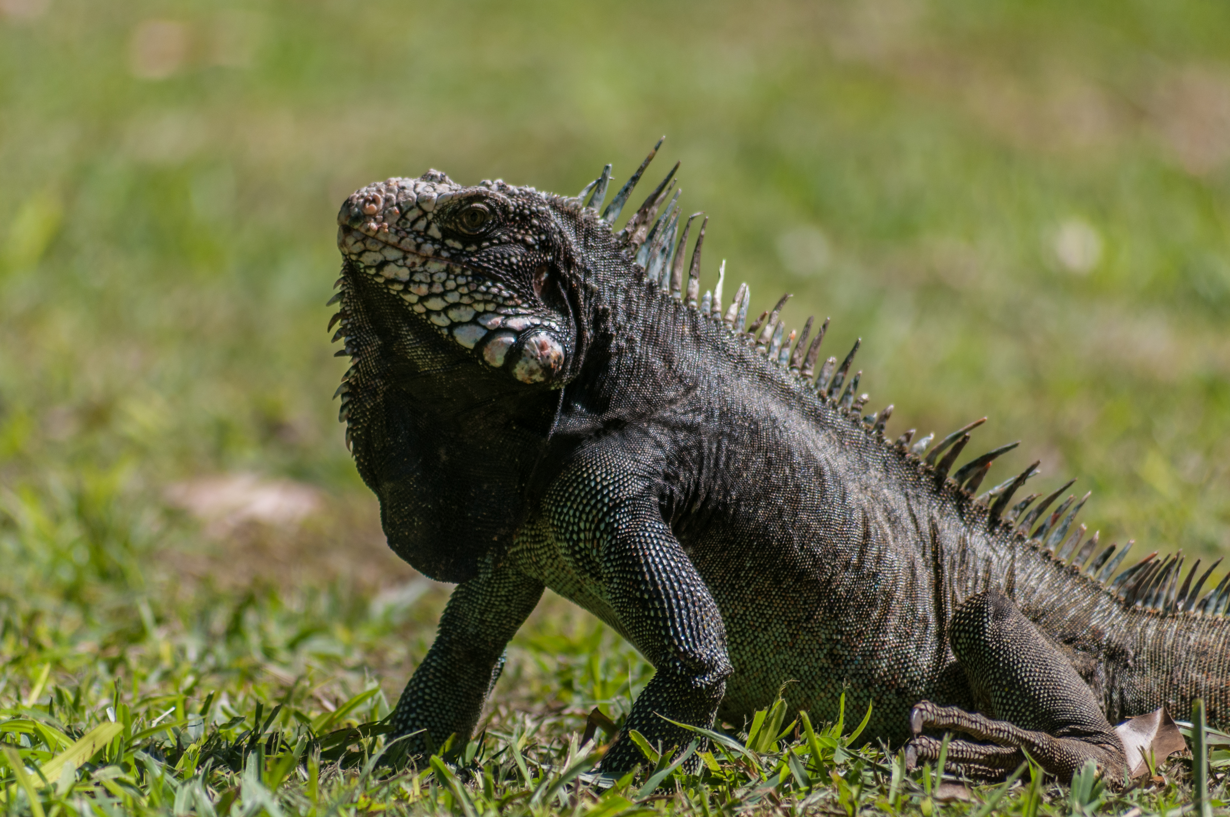 Iguana iguana en Zoologico de Barquisimeto